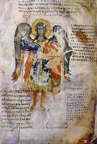 Архангел Михаїл. Мініатюра Лавришівського євангелія. Фол. 1.